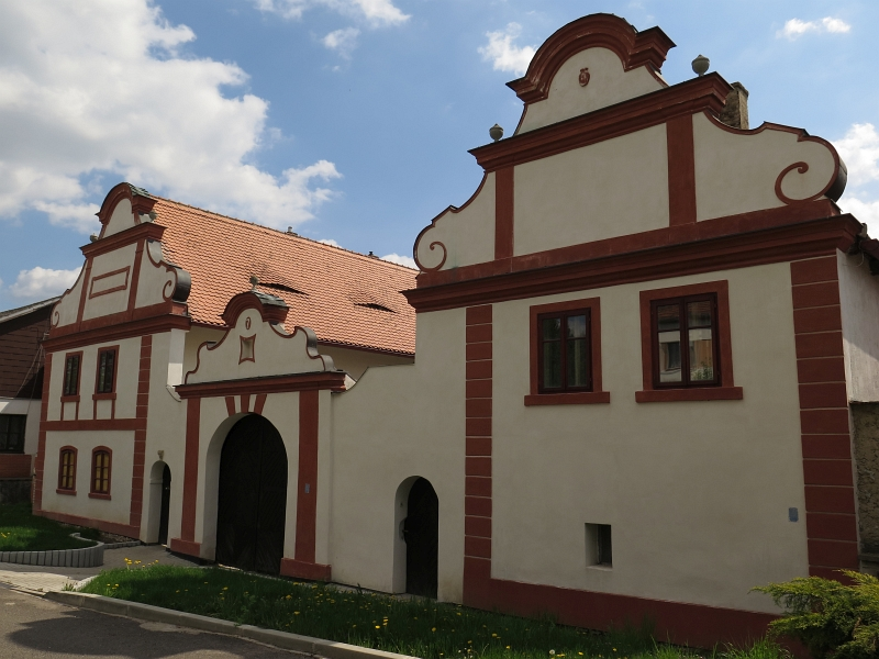 Usedlost čp. 7, Keblice 7, Keblice.